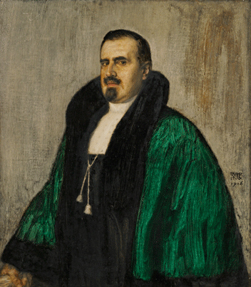 Porträt des Prof. Dr. Josef Albert Amann Jr. (1866–1919),Gynäkologe, Universitätsprofessor und Kunstsammler. Öl auf Holz, signiert und datiert 1916. 89 x 78 cm.